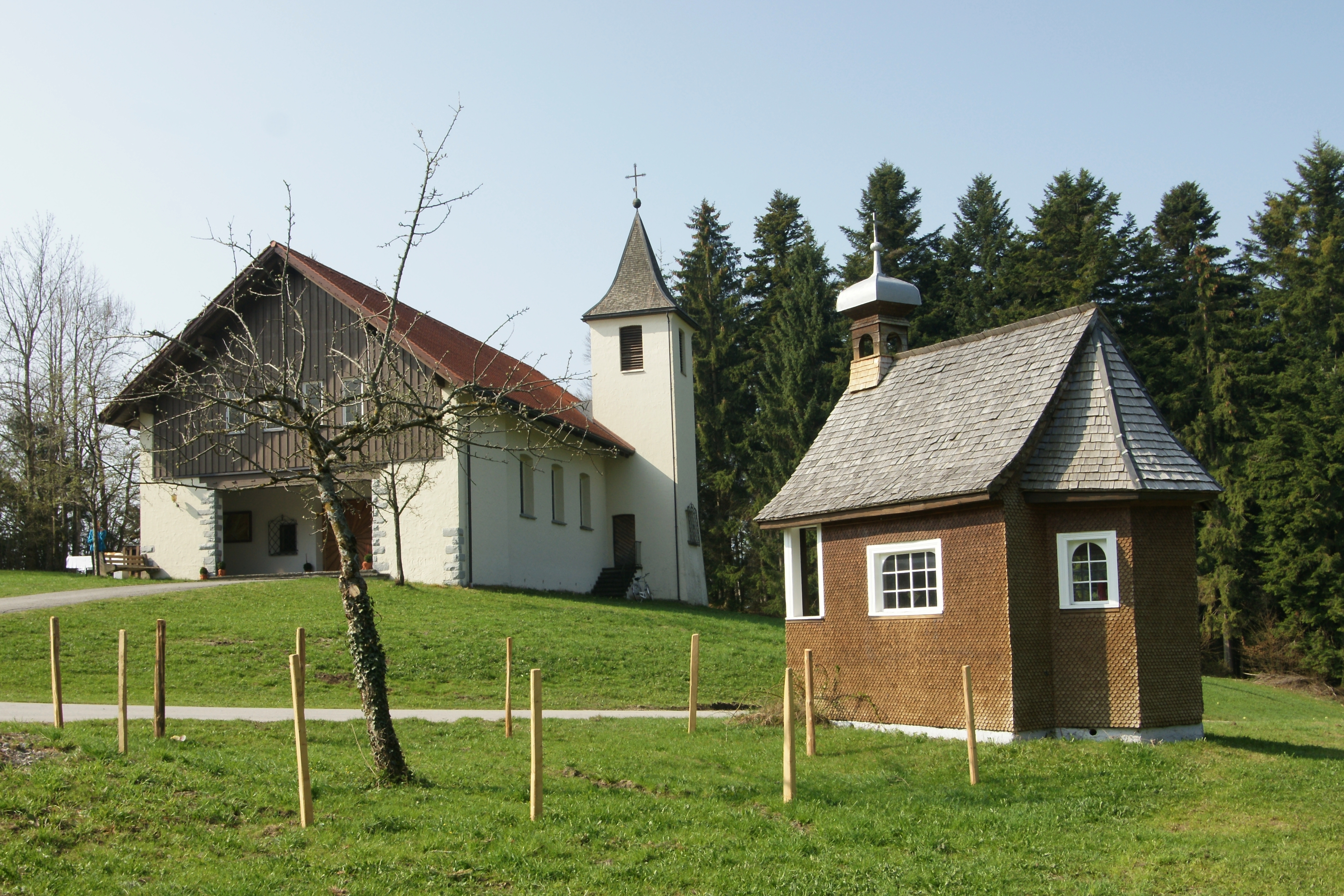 1934 erbaut: alte Fatimakapelle neben der Kapelle zu Unserer Lieben Frau von Fatima auf dem Stollen auf am Geserberg in Langen bei Bregenz. Die neue Kapelle wurde 1951/52 erbaut nach Plänen von Willibald Braun.